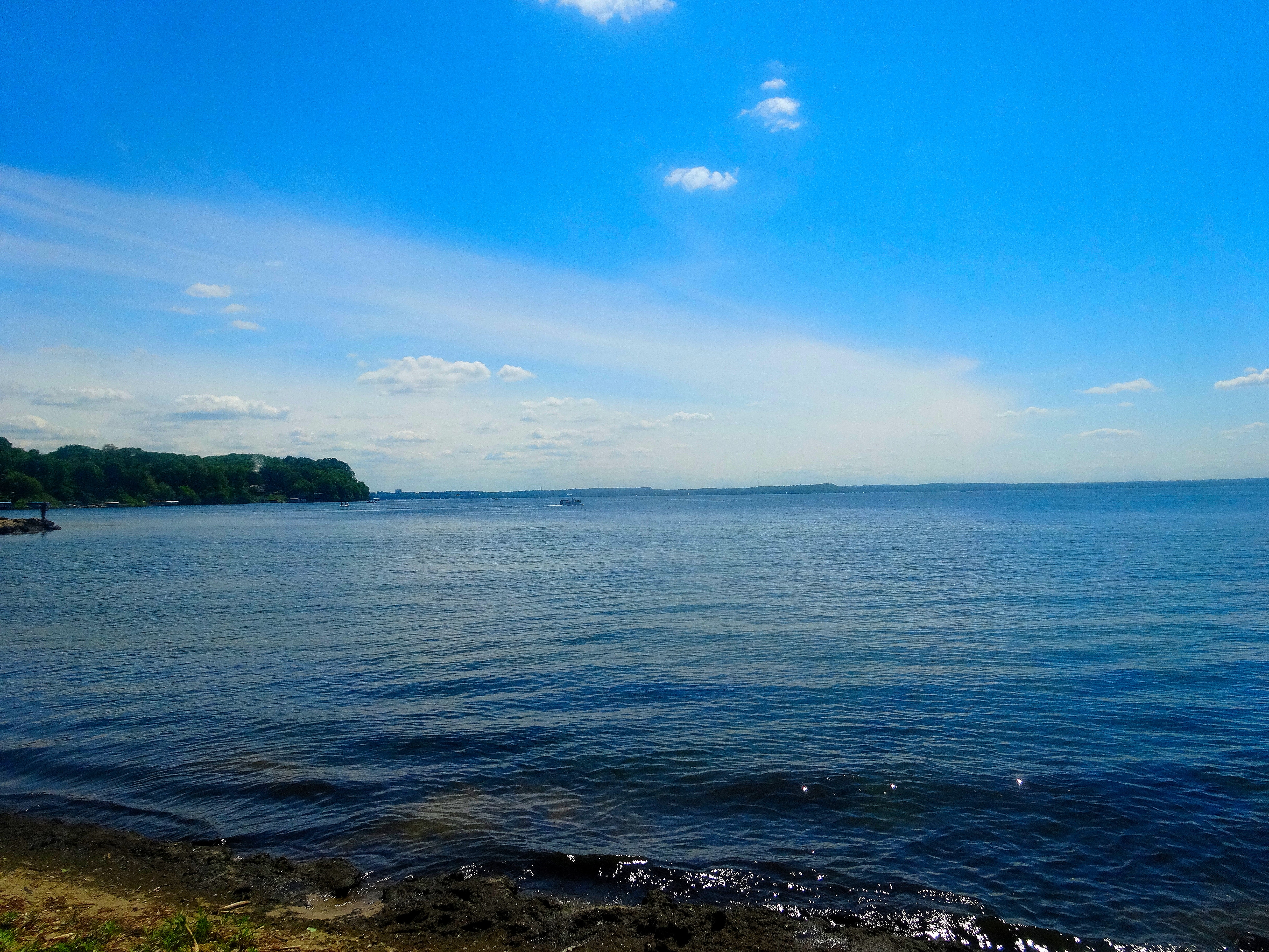 Lake Mendota